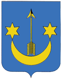 herb turki XVI wiek (Sas)